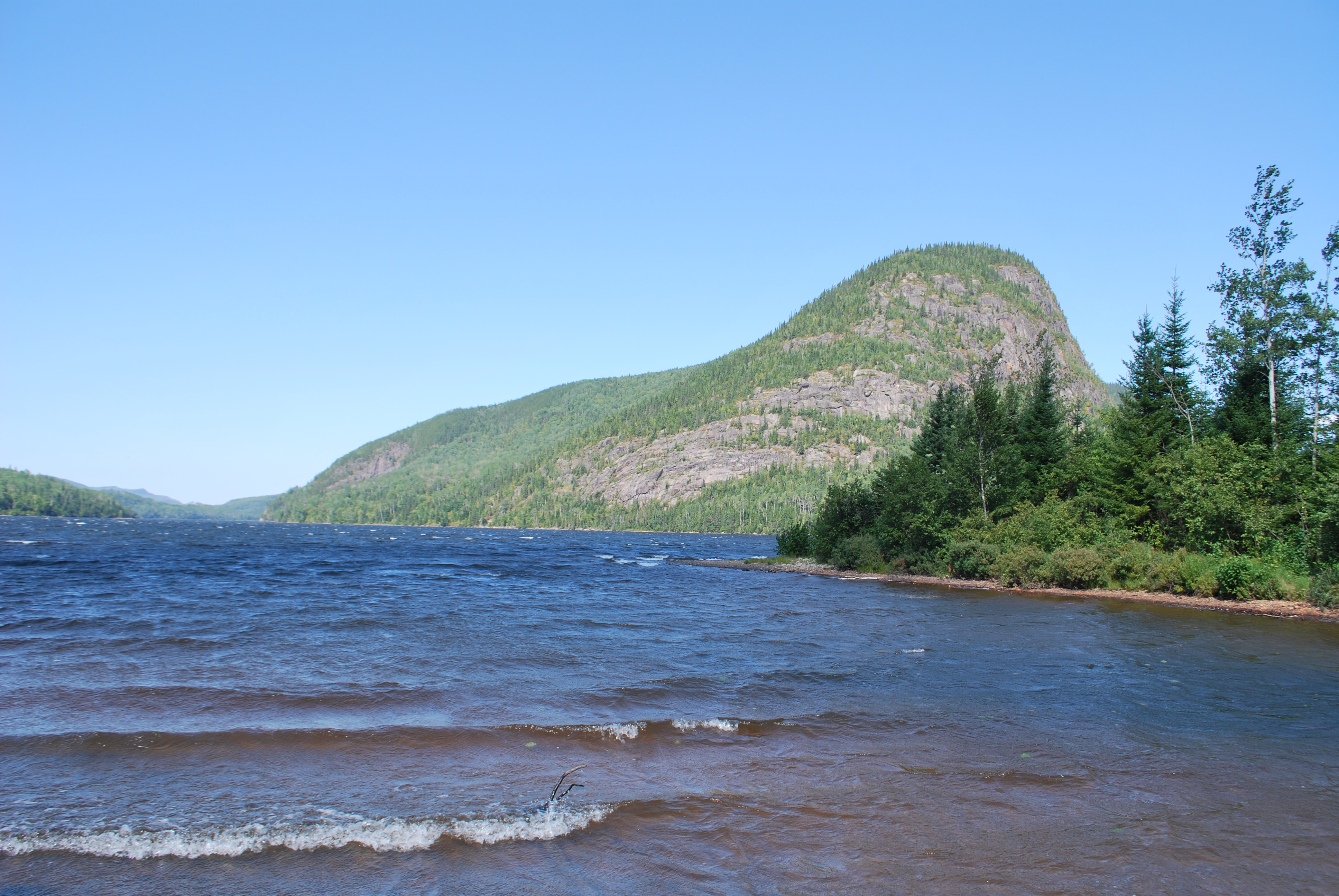 Alentours du Lac Ha! Ha!, à Ferland-et-Boilleau, au Québec.